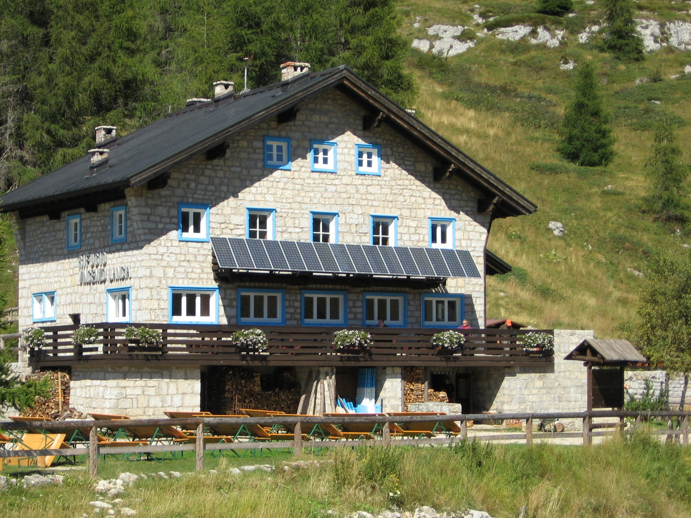 Rifugio Lancia